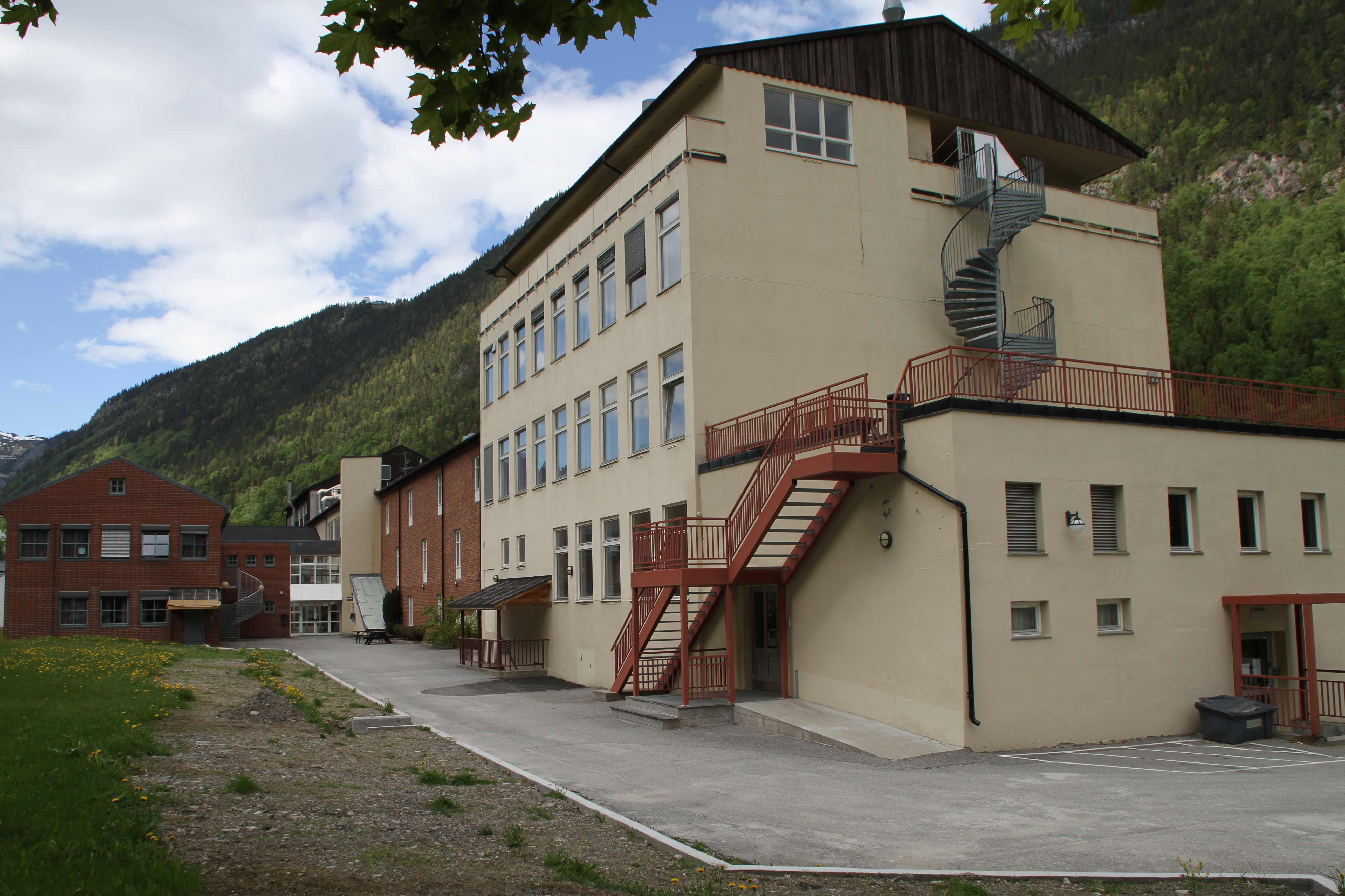 Rjukan videregående skole